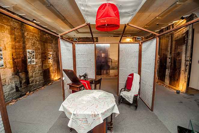 Уникальный выставочный проект, выстроенный на письменных и фотографических материалах из архива г-жи Элеоноры Лорд Прей. Главная цель выставки — показать колорит и насыщенность местной жизни в начале XX века.